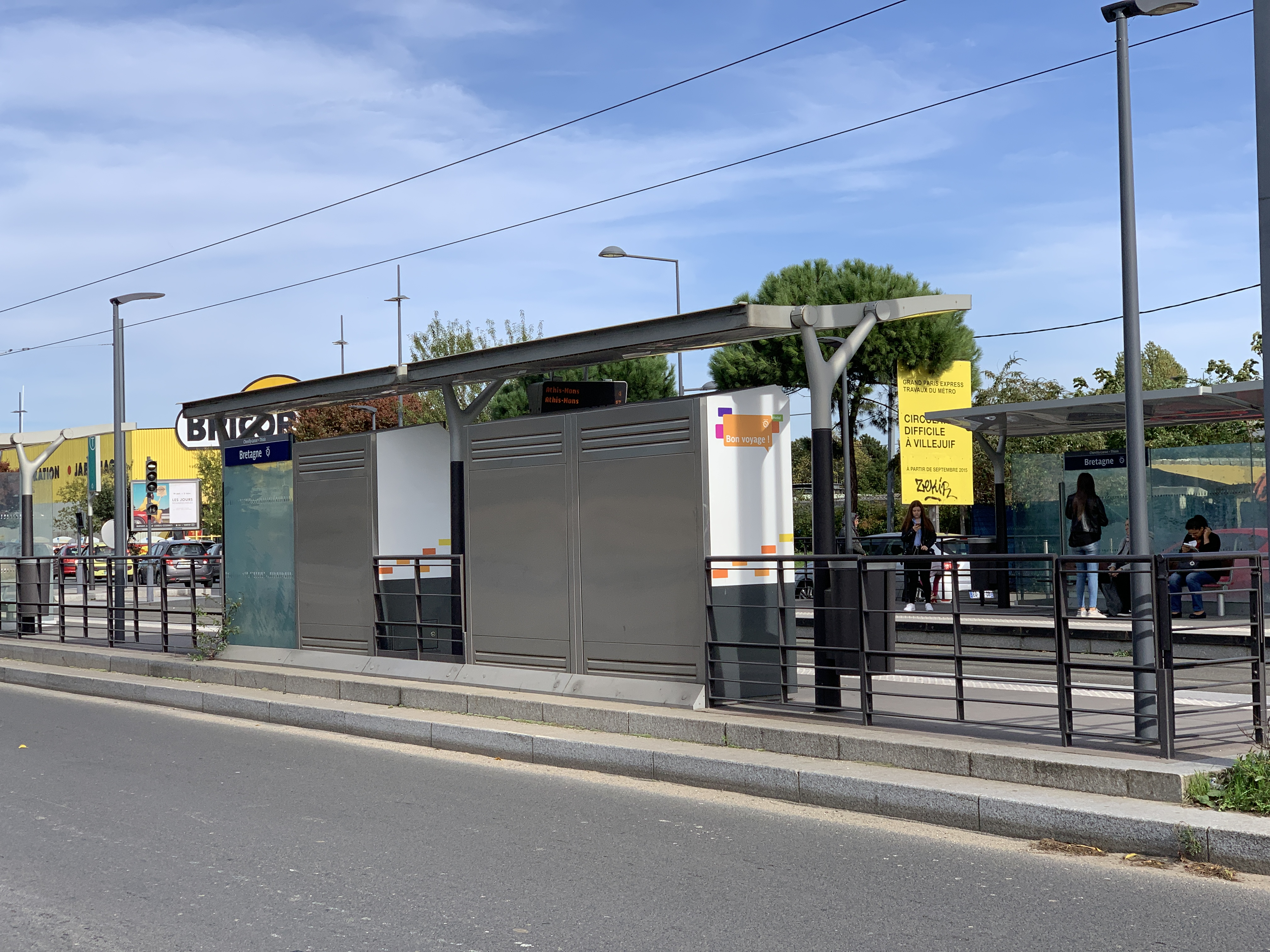 Station Bretagne de la ligne 7 du tramway d'Île-de-France, Chevilly-Larue.